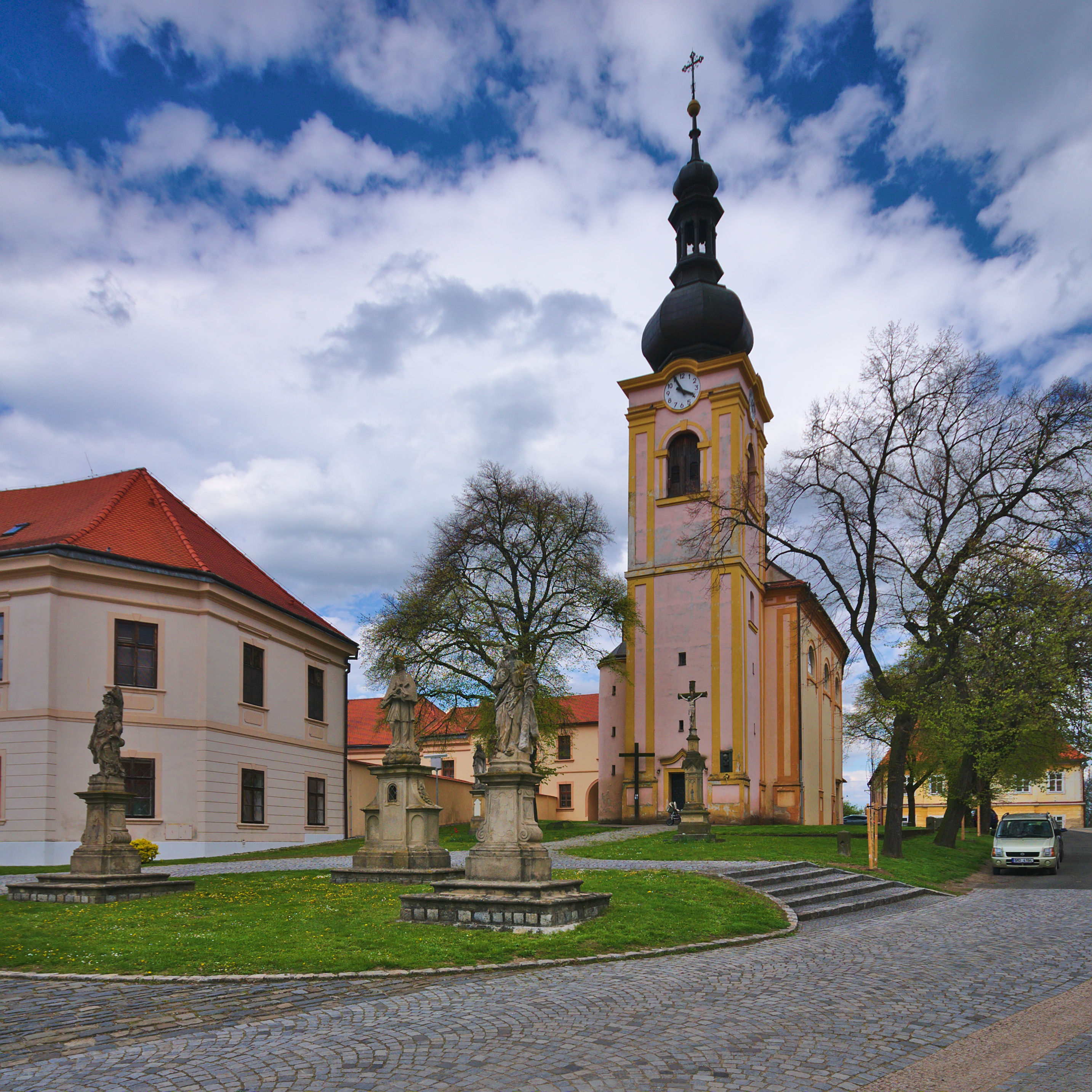 Kostel svatého Václava, Nezamyslice, okres Prostějov